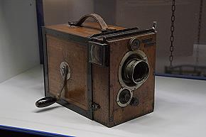 filmcamera made around 1900 handdriven